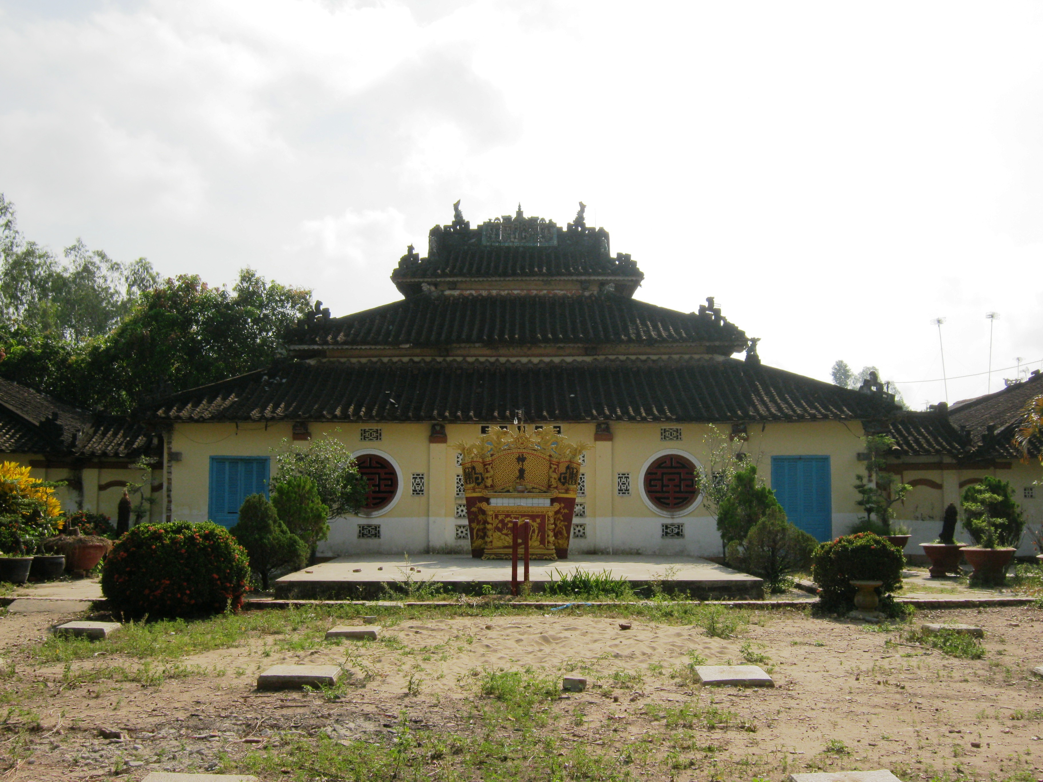 Đình Định Yên tại xã Định Yên (thuộc huyện Lấp Vò, tỉnh Đồng Tháp, Việt Nam) được xây dựng năm Canh Tuất (1910).